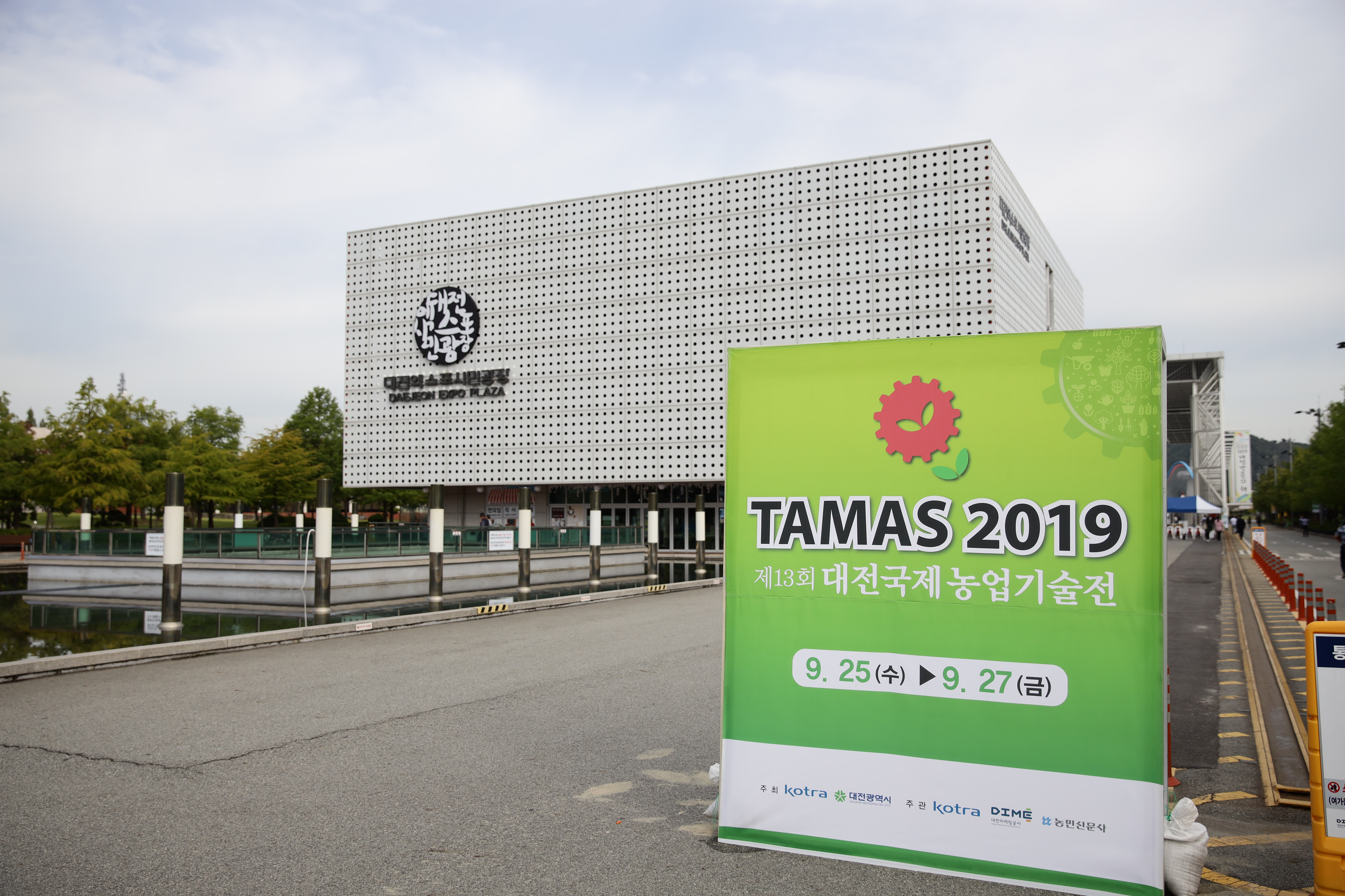 행사장 전경